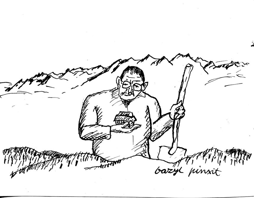 Stanisław „Śledź” Moskal buduje dom w Wierzbanowej – rysunek Bazylego Murawy (2018)